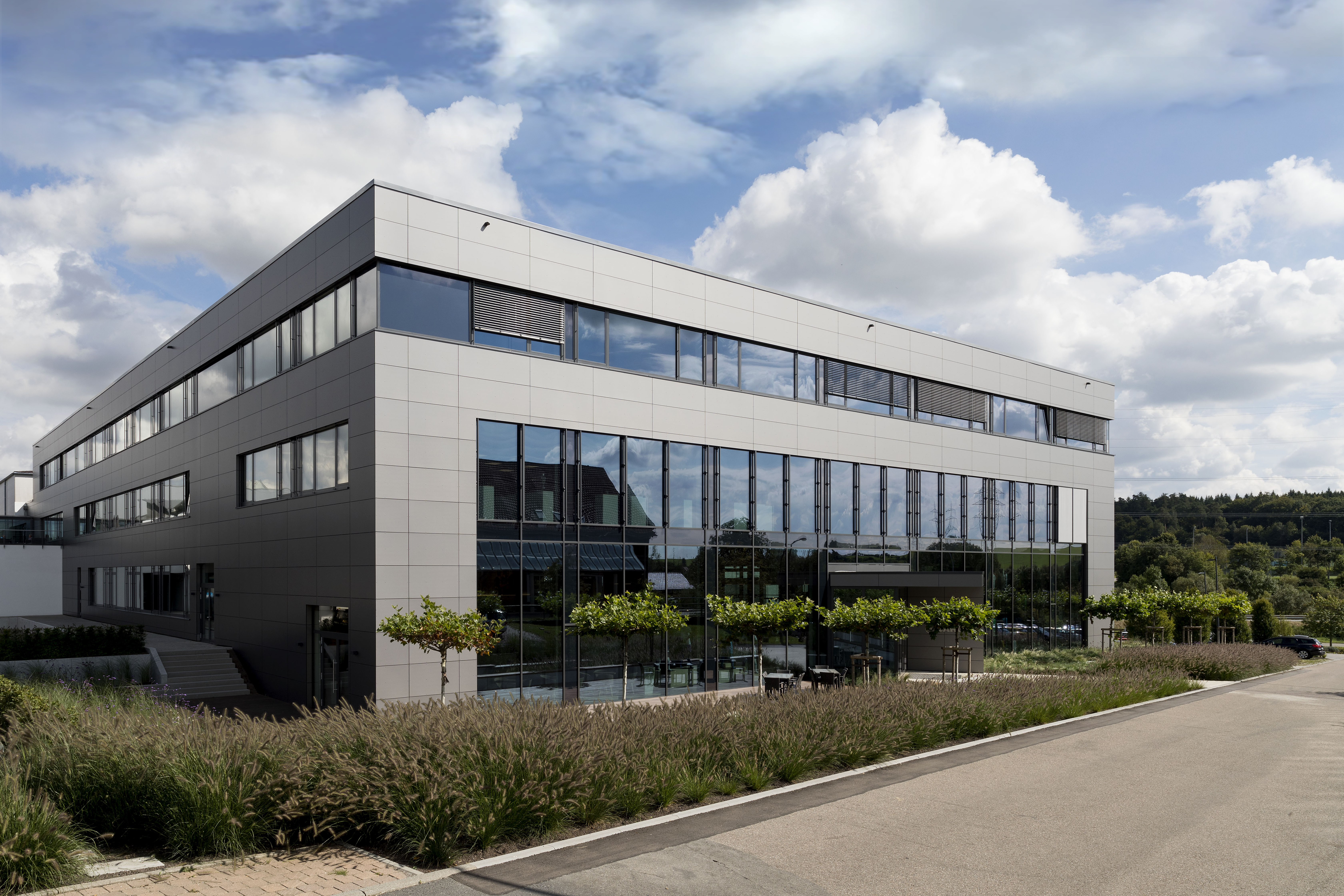 JAKO Teamcenter, FIrmensitz der JAKO AG in Mulfingen-Hollenbach